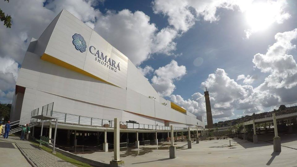 Shopping